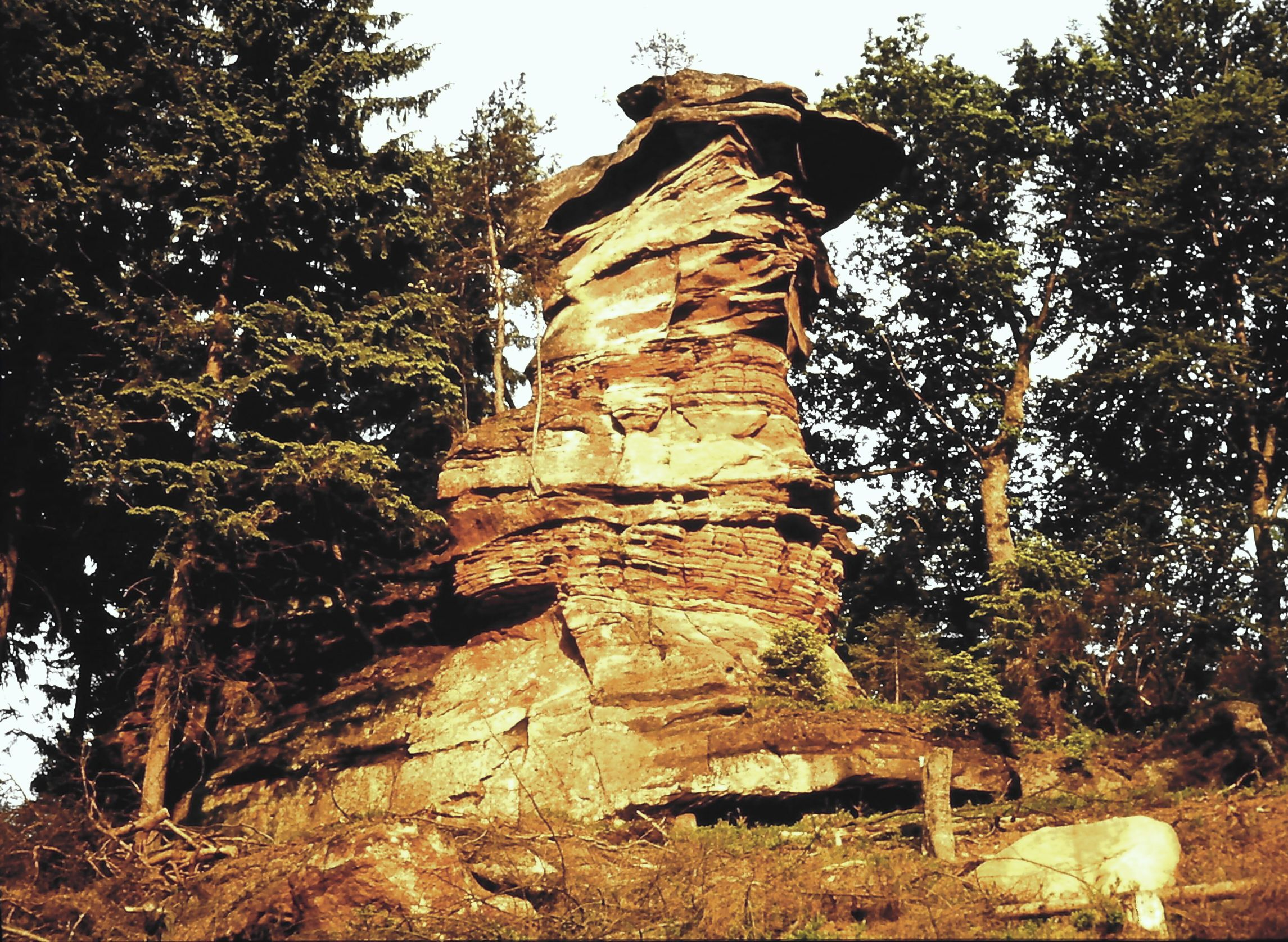 Sandsteinfelsen im Pfälzerwald, Lemberg, OT Salzwoog